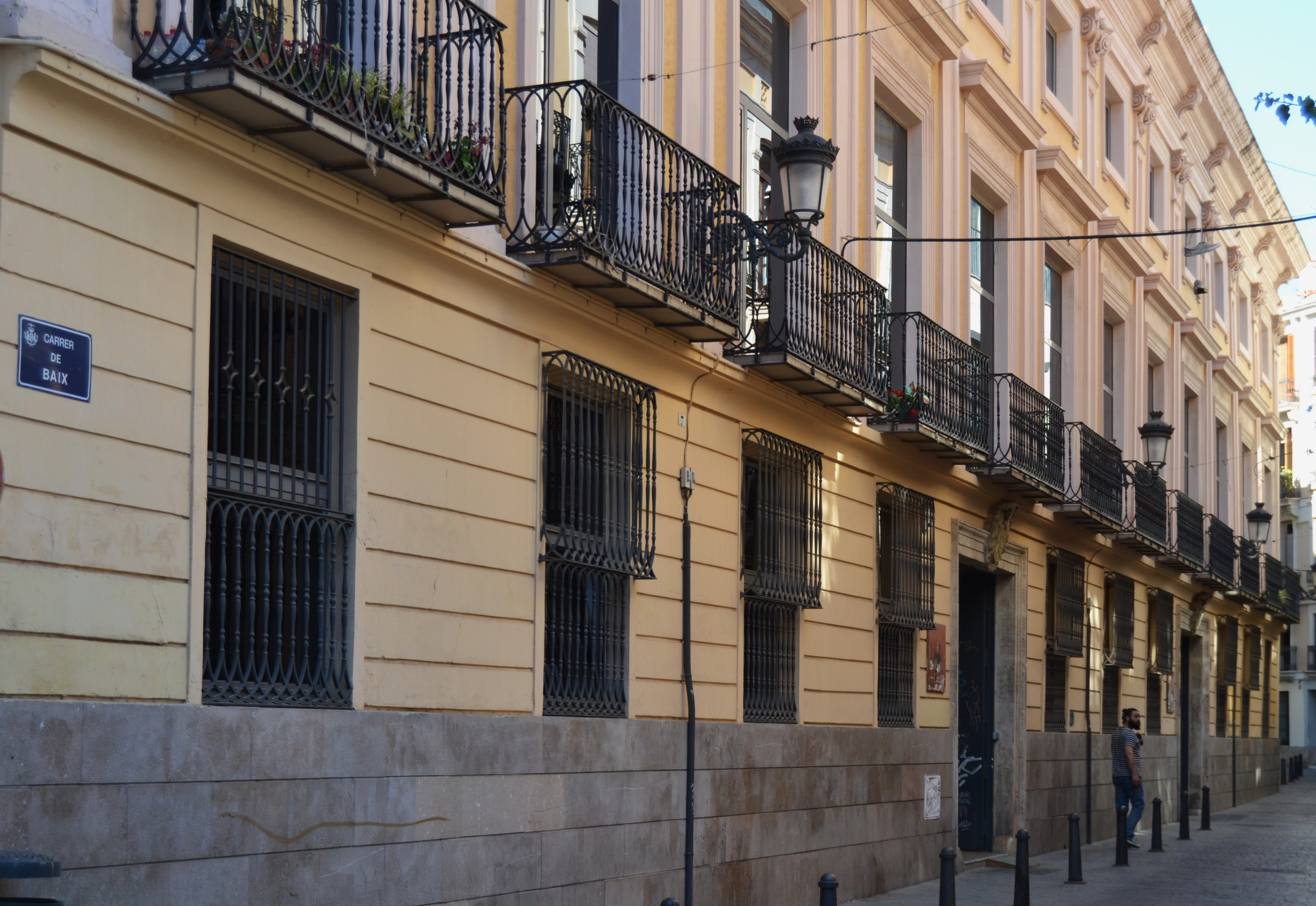 Palau de Raga o casa dels marquesos de González de Quirós, València.